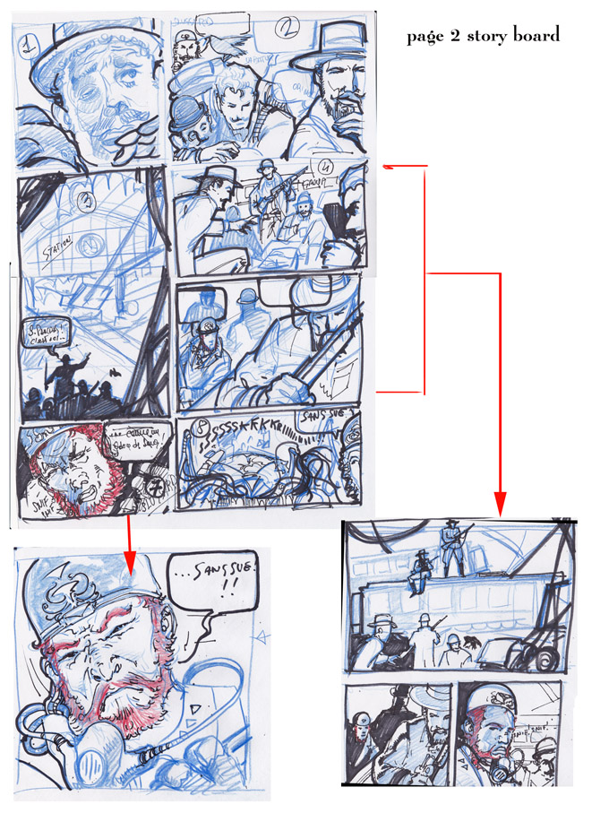 story board inedito per tavola a fumetti